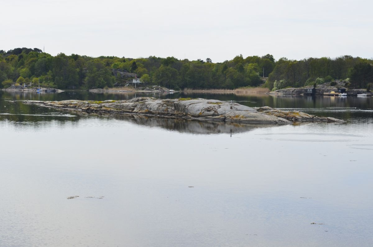 Torskerumpa i Tangenkilen er en fast hekkeplass for sjøfugl.